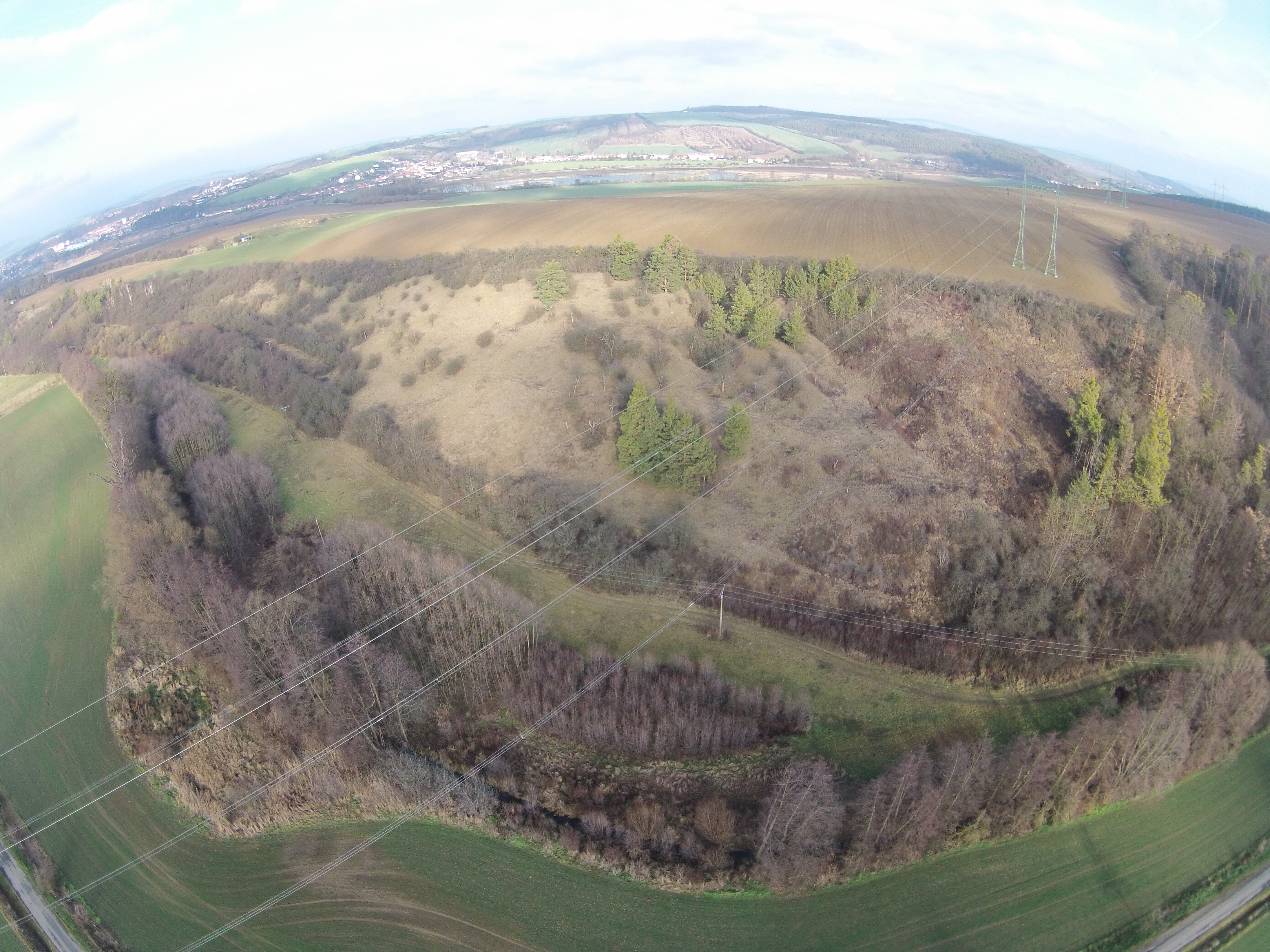 Přírodní památka Baračka.